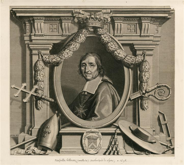 Gravure représentant Camille de Neufville de Villeroy